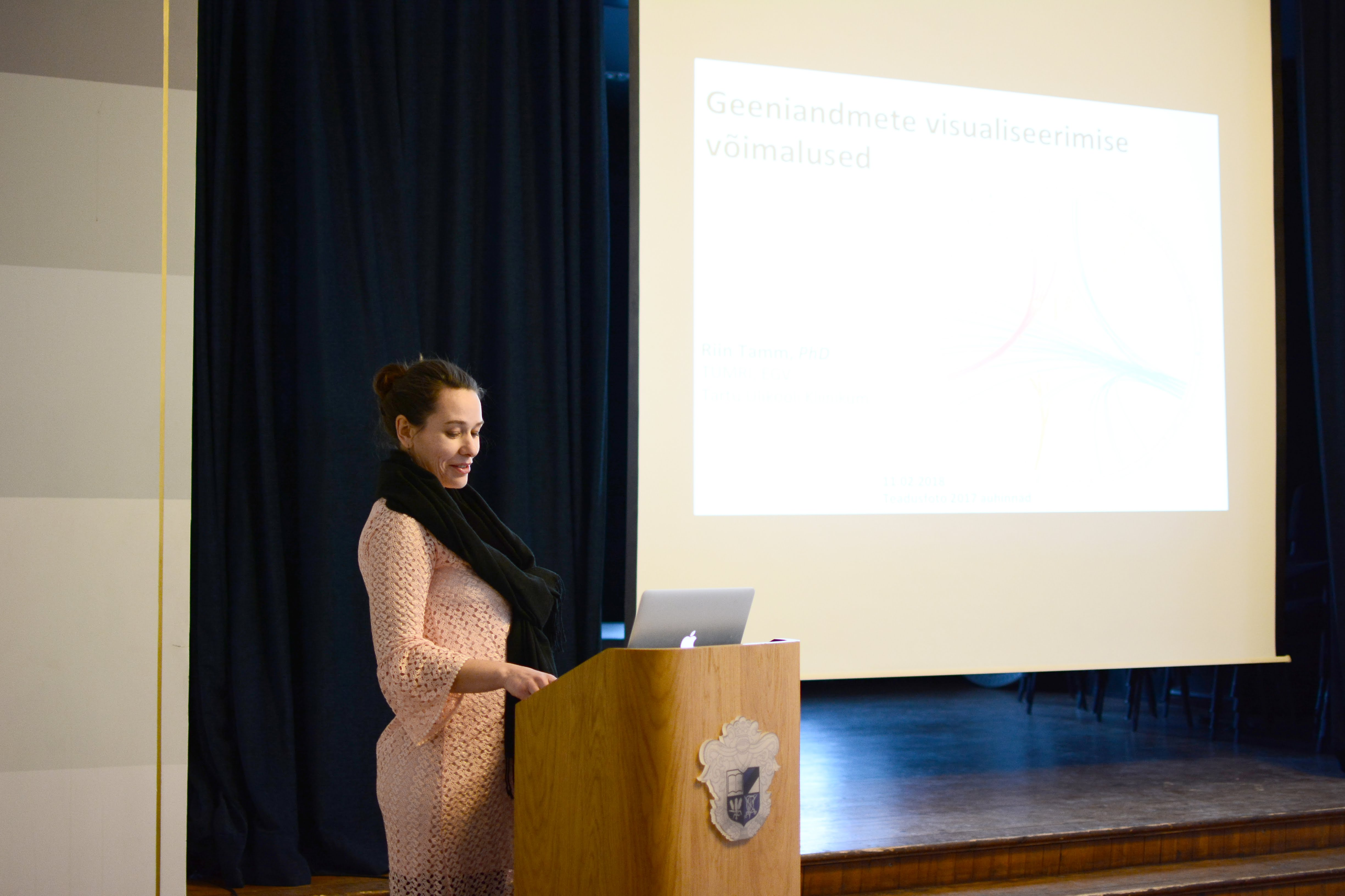 Teadusfoto 2017 võistluse parimate väljakuulutamine Eesti Üliõpilaste Seltsi majas. Geeniteadlane Riin Tamm esinemas ettekandega.